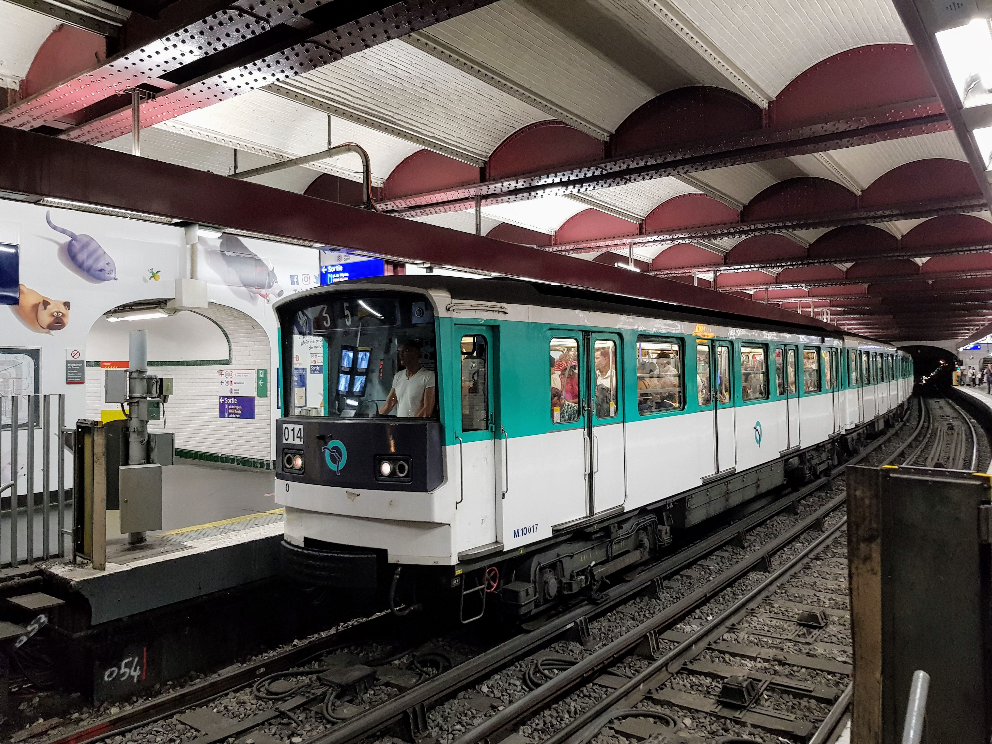 MF 67 n°014 sur la ligne 3 à Opéra.